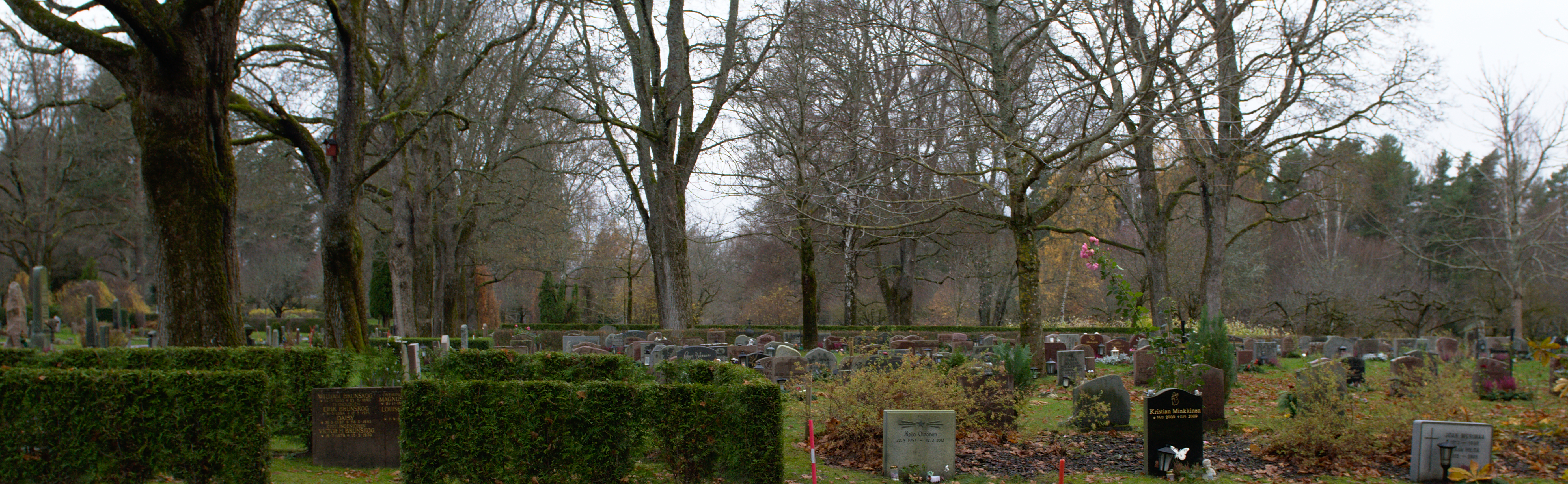 S:t Eskils kyrkogård i Eskilstuna. Gravar.